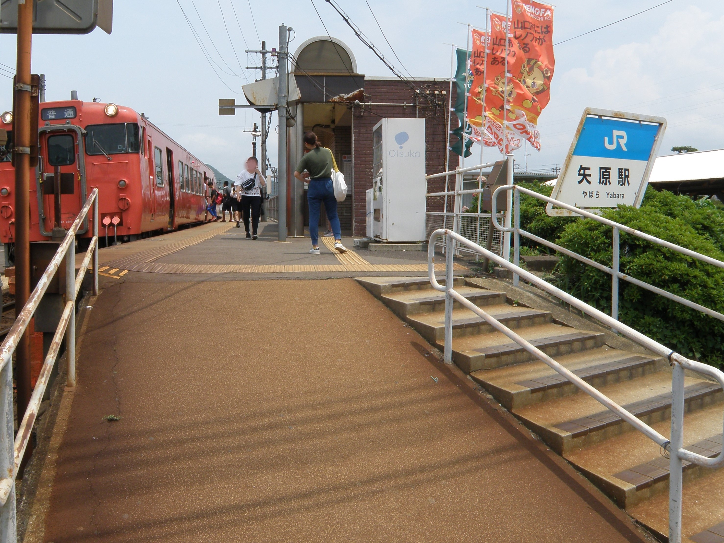 JR山口線 矢原駅 入口 （人物の顔が映り込んでいる部分を加工済み）